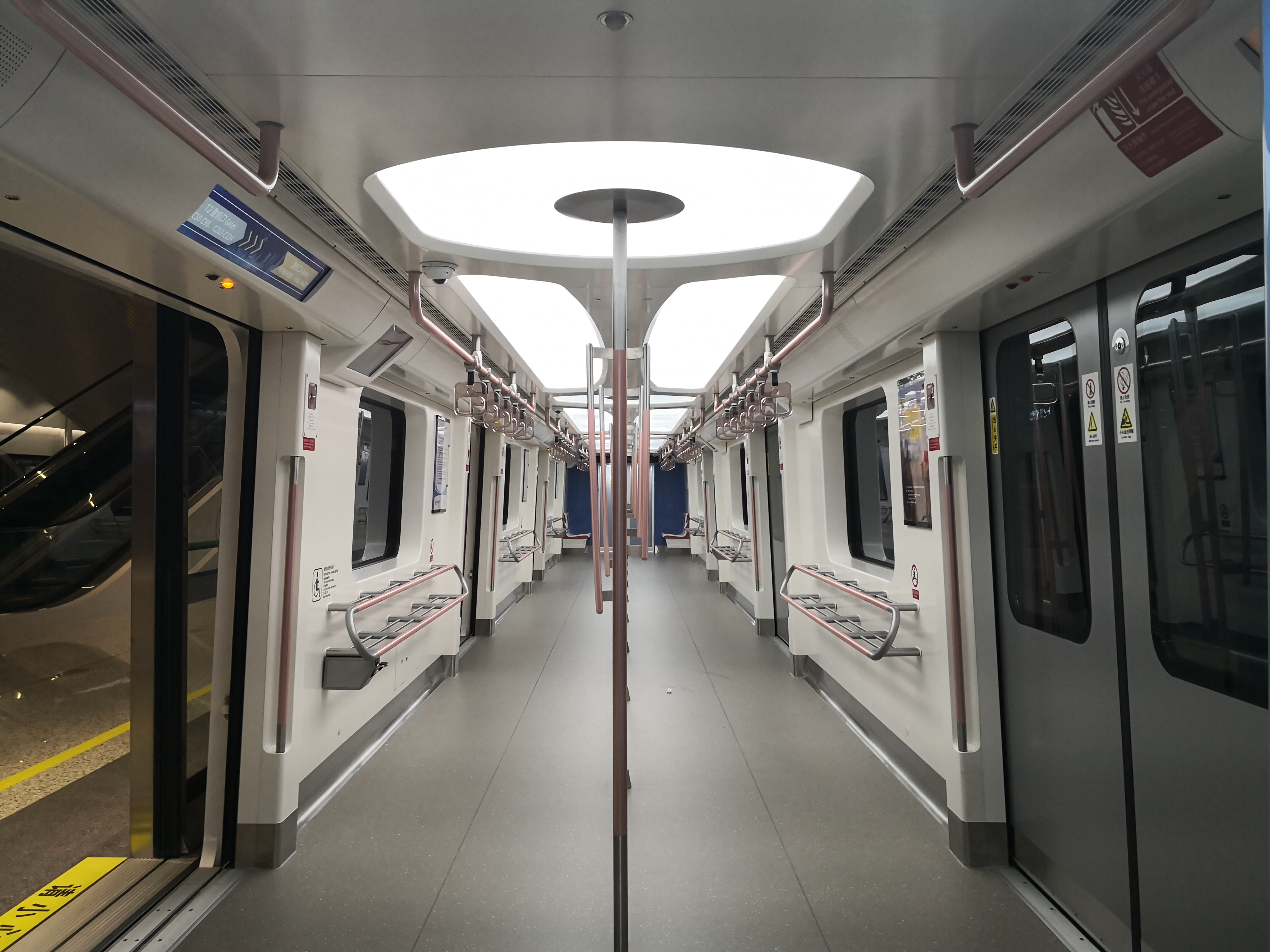 上海浦东国际机场卫星厅捷运车厢